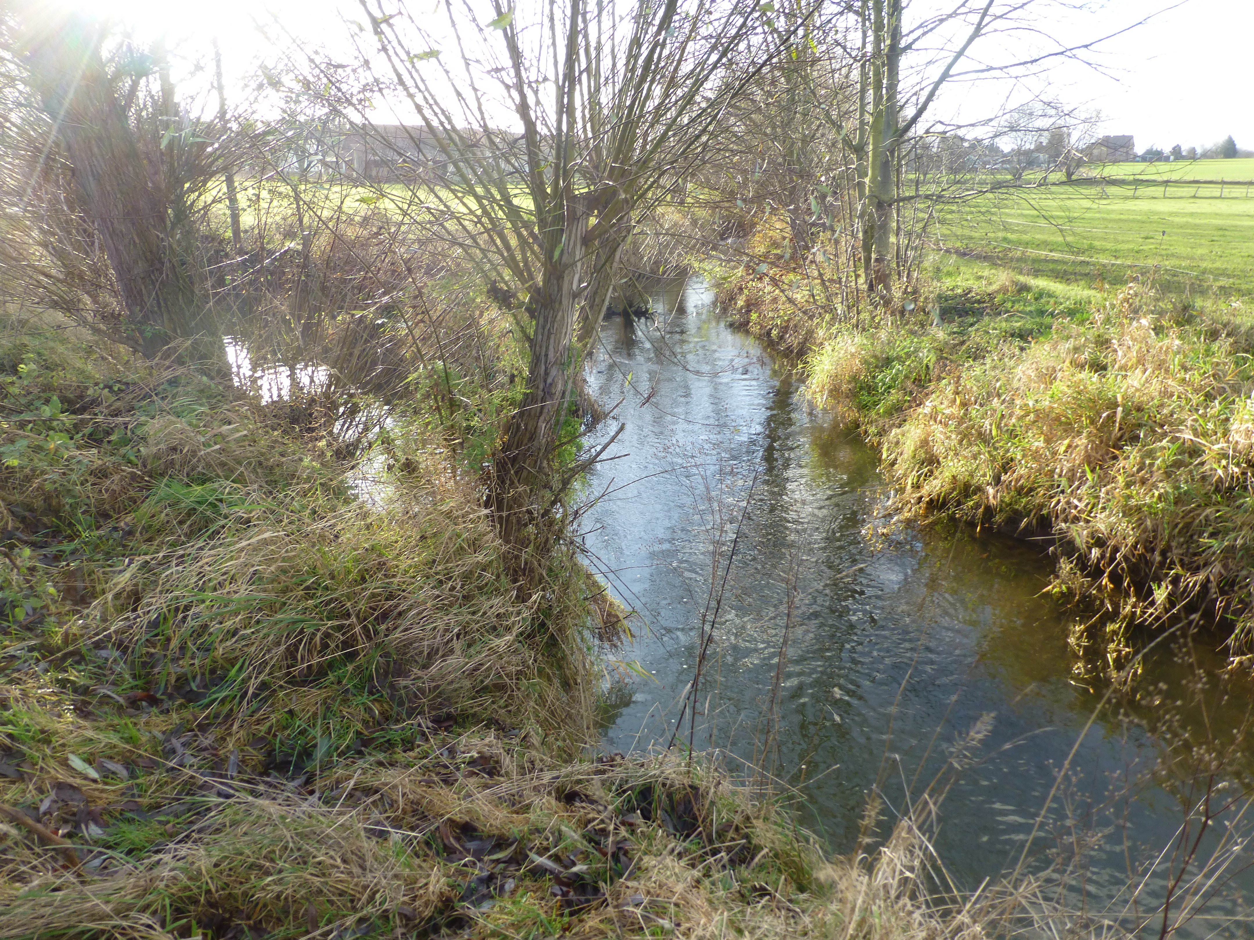 Mündung der (größeren?) Aue (in der Mitte) in die Suhle (von links kommend) bei Germershausen